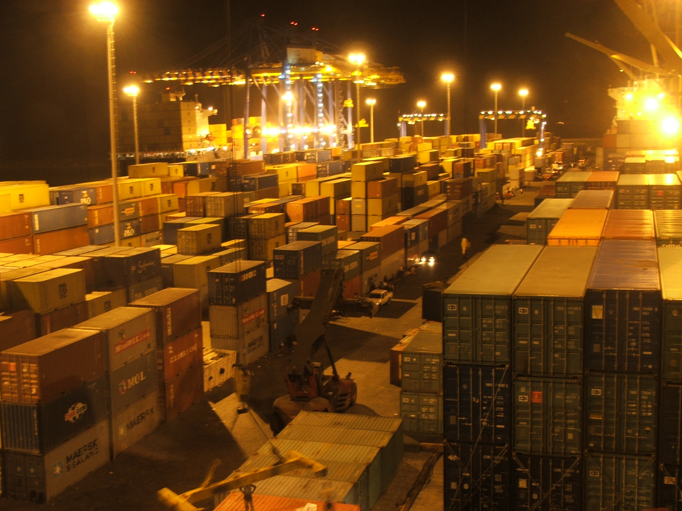 Nächtlicher Blick auf den Containerumschlag in Tema/Ghana